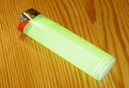 En gul en-gangslighter.